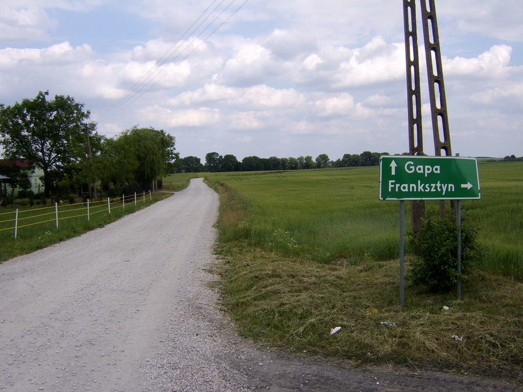 Gapa - osada